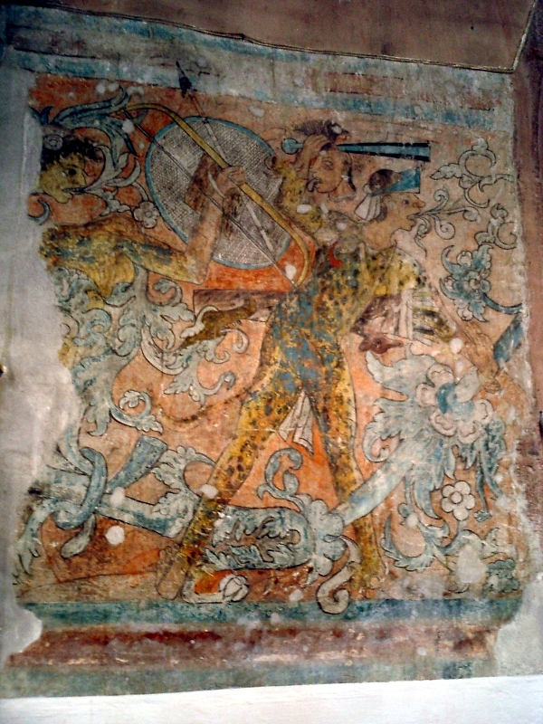 Mural de la Iglesia de San Miguel Arcángel, Ixmiquilpan